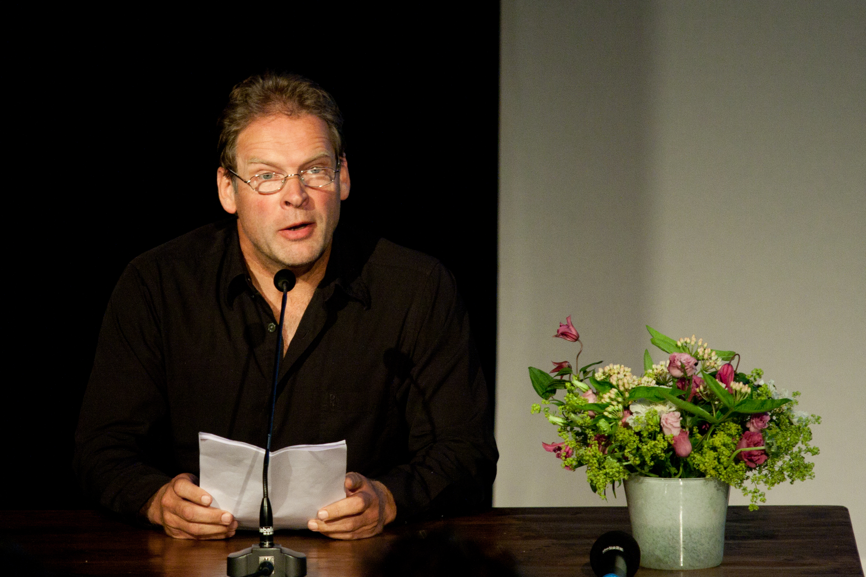 'Nu volgt een programma in de zendtijd voor Politieke Partijen', 9 september @ De Balie, Amsterdam